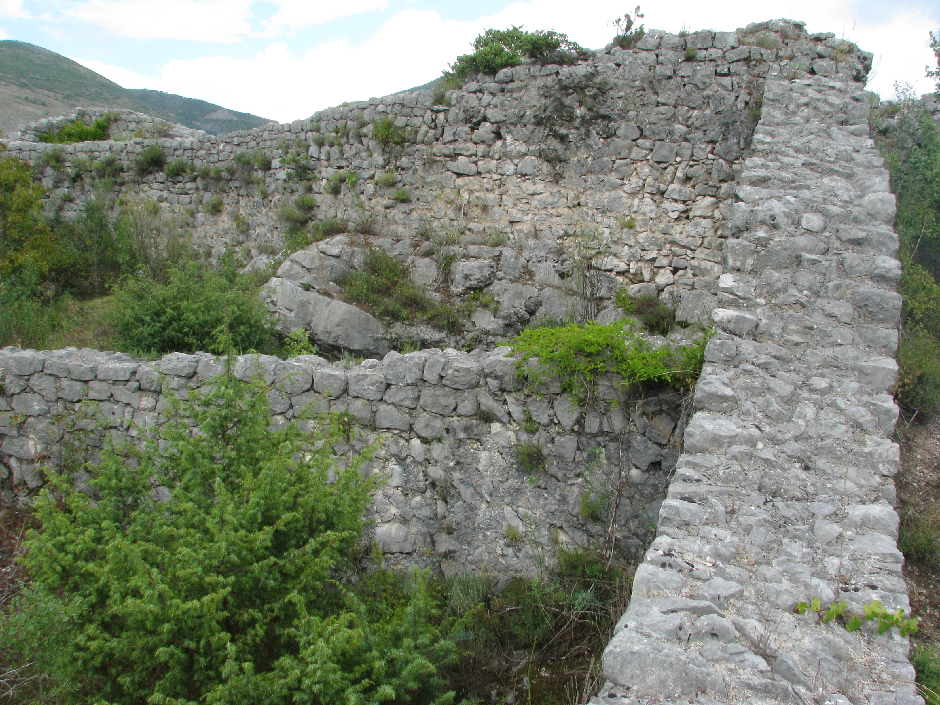 NKD646, Srednjovjekovni grad Mičevac, pet kilometar uzvodno od Trebinje, na desnoj obali Trebišnjice